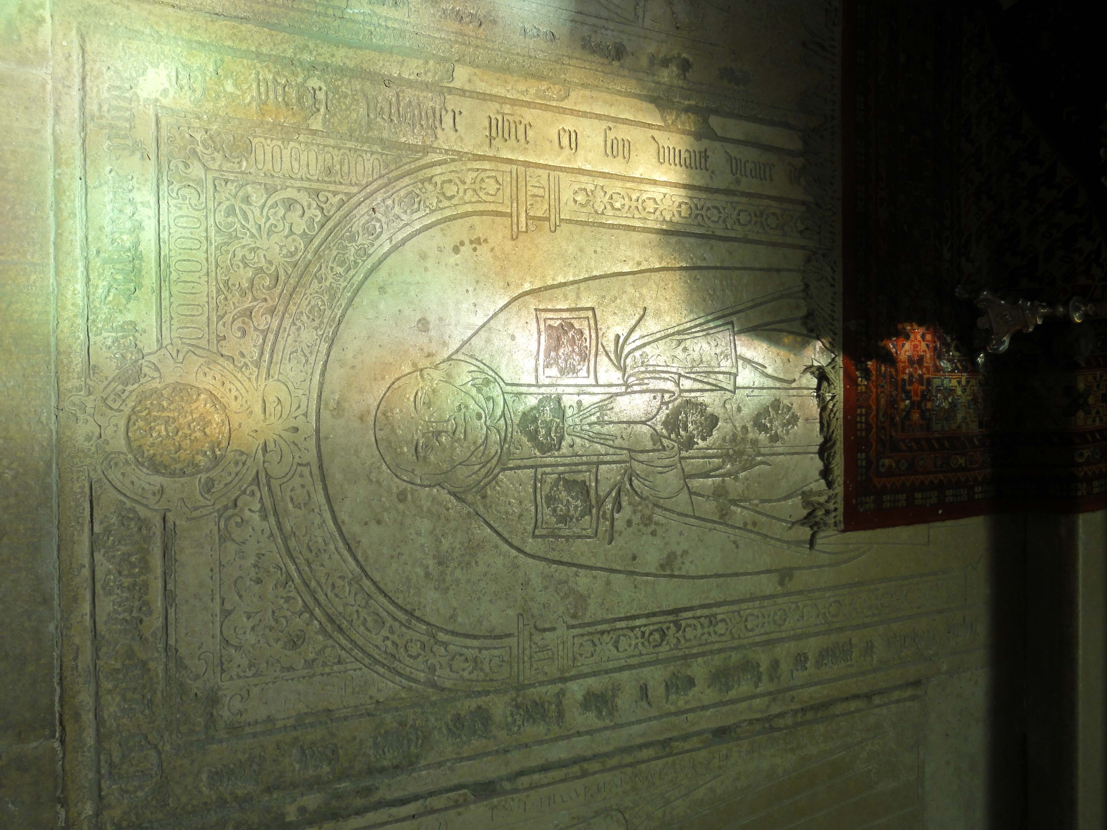 Dalle funéraire à effigie gravée du prêtre Pierre Pasquier, XVIe siècle.